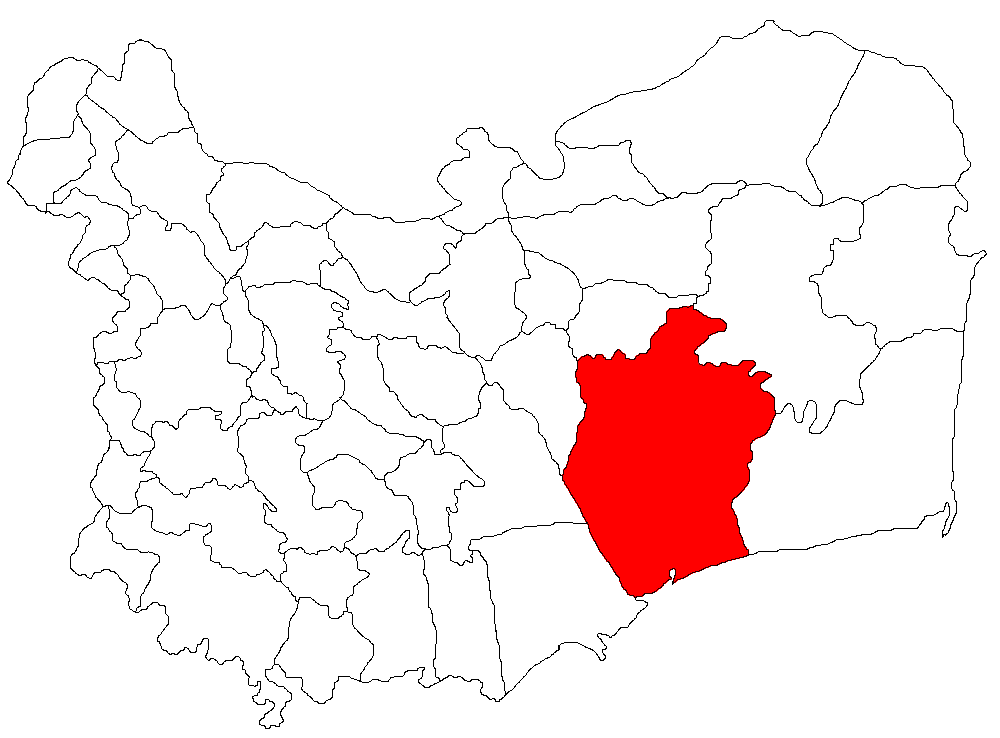 Categorie:Hărţi ale judeţului Tulcea